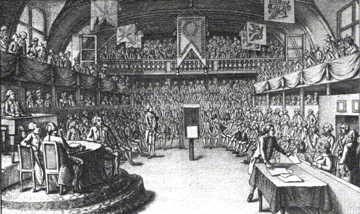 Jugement de Louis XVI par la Convention nationale dans la salle du Manège